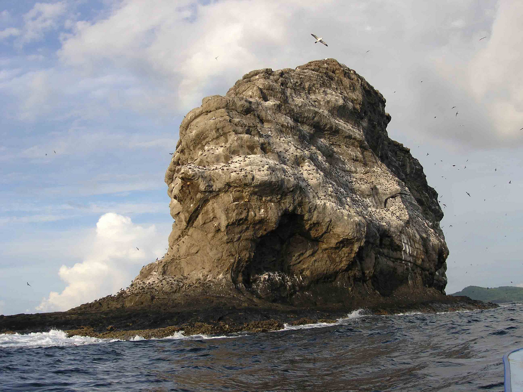 Ilôt de Mchaco, près de Mohéli, Comores